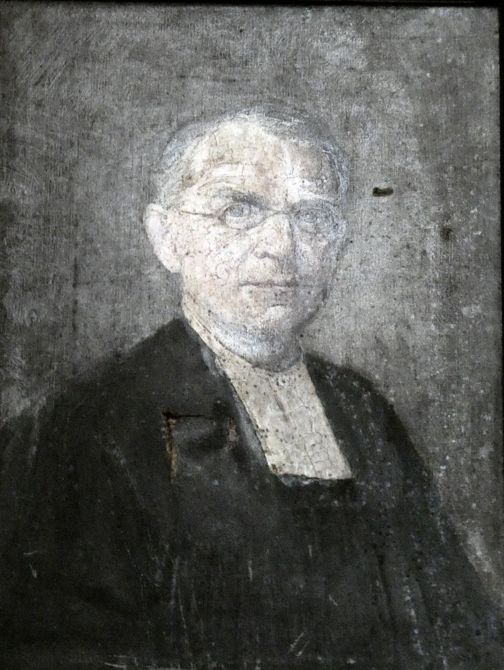 Fotografische Reproduktion (bearb.) eines Porträtgemäldes des Oberpfarrers der Marktkirche Halle Franz Theodor Förster